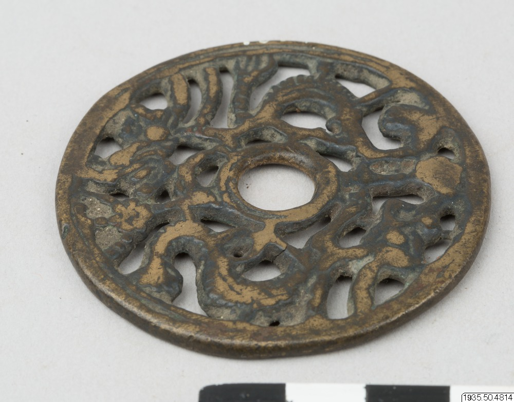 Title: amulett Description: 1935.50.4814 Hedinexpeditionen, fjärde centralasiatiska expeditionen (1927-1935) Classifications Type: Föremål amulett Subject: Kulturhistoria Sven Hedin Medium: metall Properties Language: sv Provenance Publisher: Etnografiska museet Identifier: 1935.50.4814 H.4814 Institution: Etnografiska museet Provider: Swedish Open Cultural Heritage | K-samsök Providing Country: Sweden